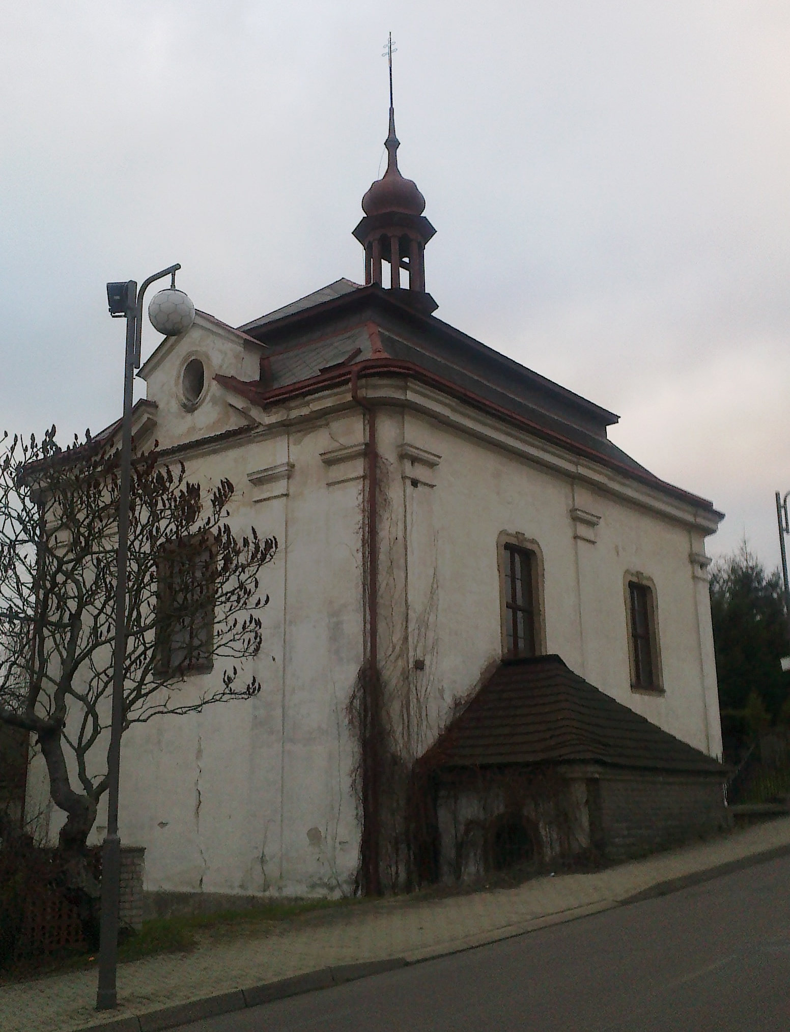 vé Město nad Metují - kostel sv. Jana Nepomuckého